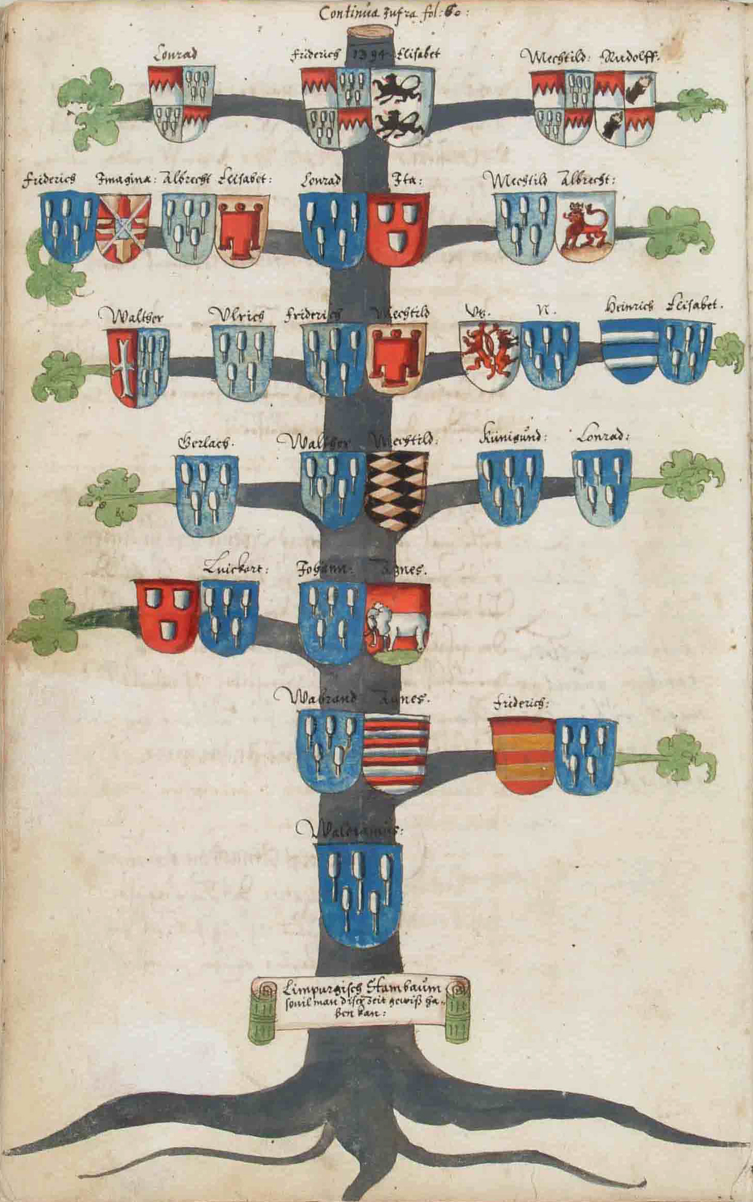 Stammbaum der Erbschenken von Limpurg zu Obersontheim, 1593 (StAL B 113 I Bü 2194 S. 21 R.).